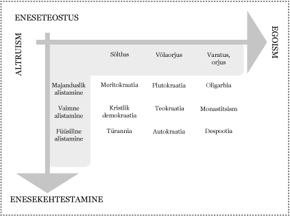 Elitaristliku ühiskonnakorralduse vormid vabaduse võrdsuse telgedele paigutatuna